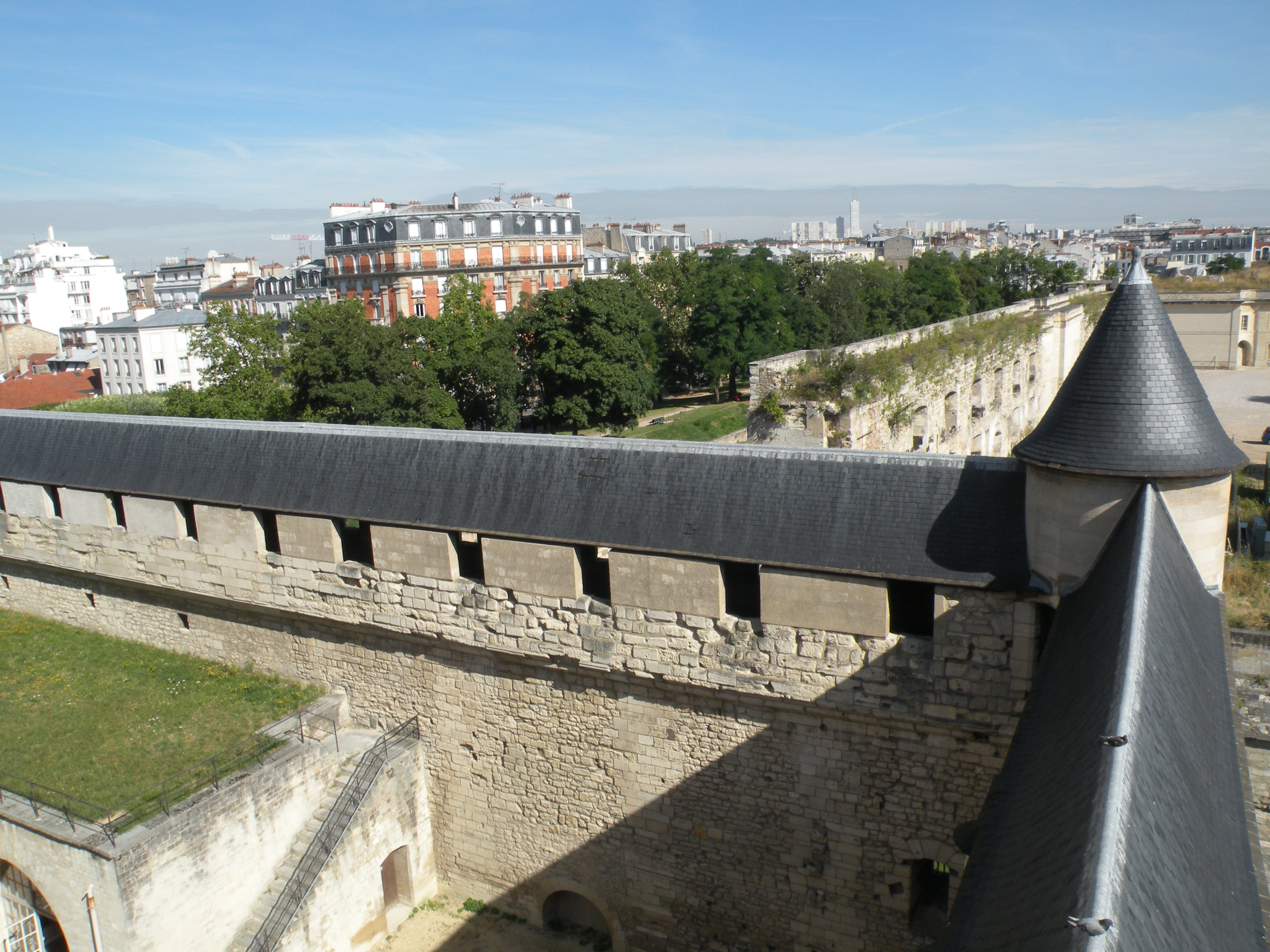 Château de Vincennes - Chemise du donjon chemin de ronde